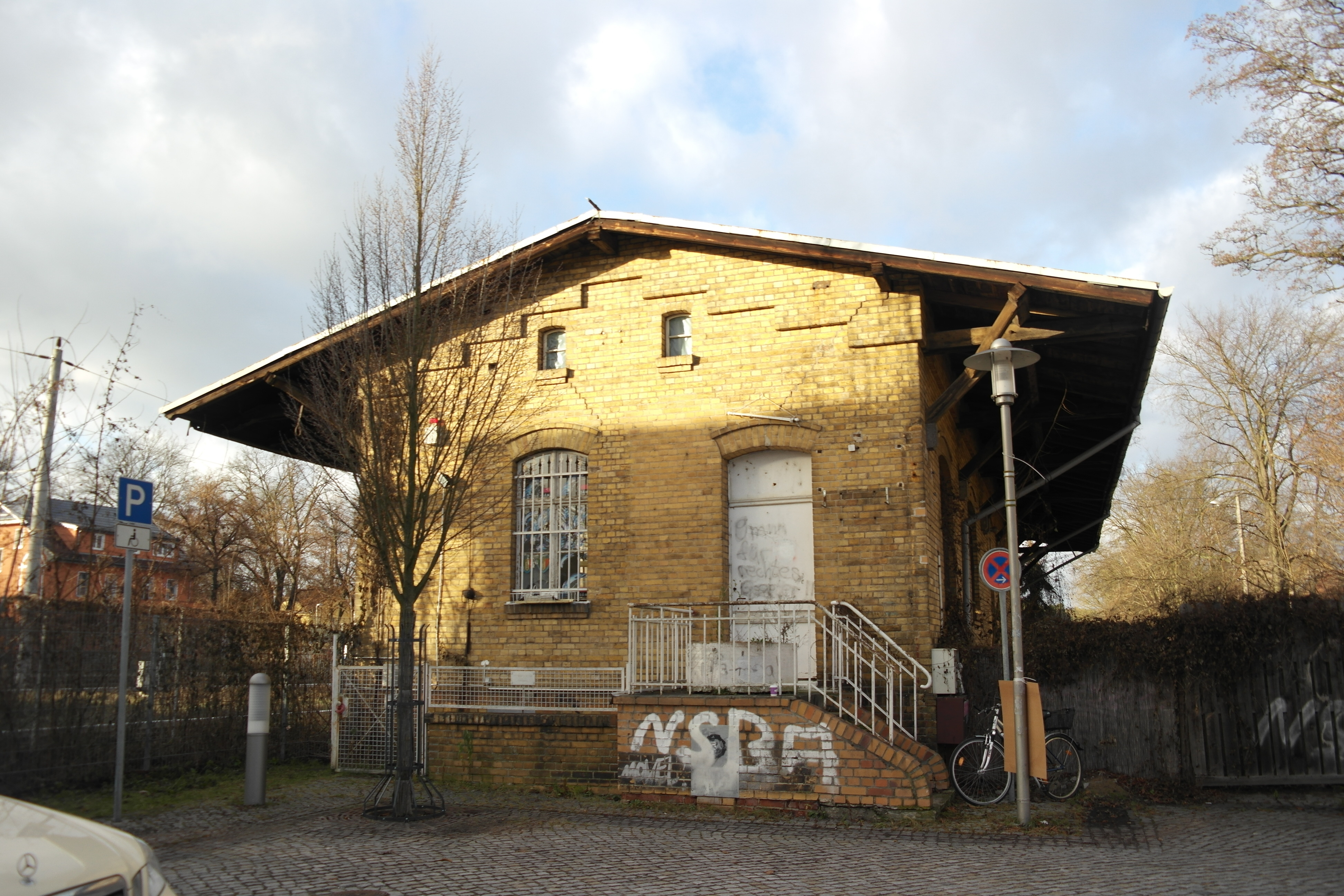 Bf. Zeuthen, Güterschuppen, denkmalgeschützt